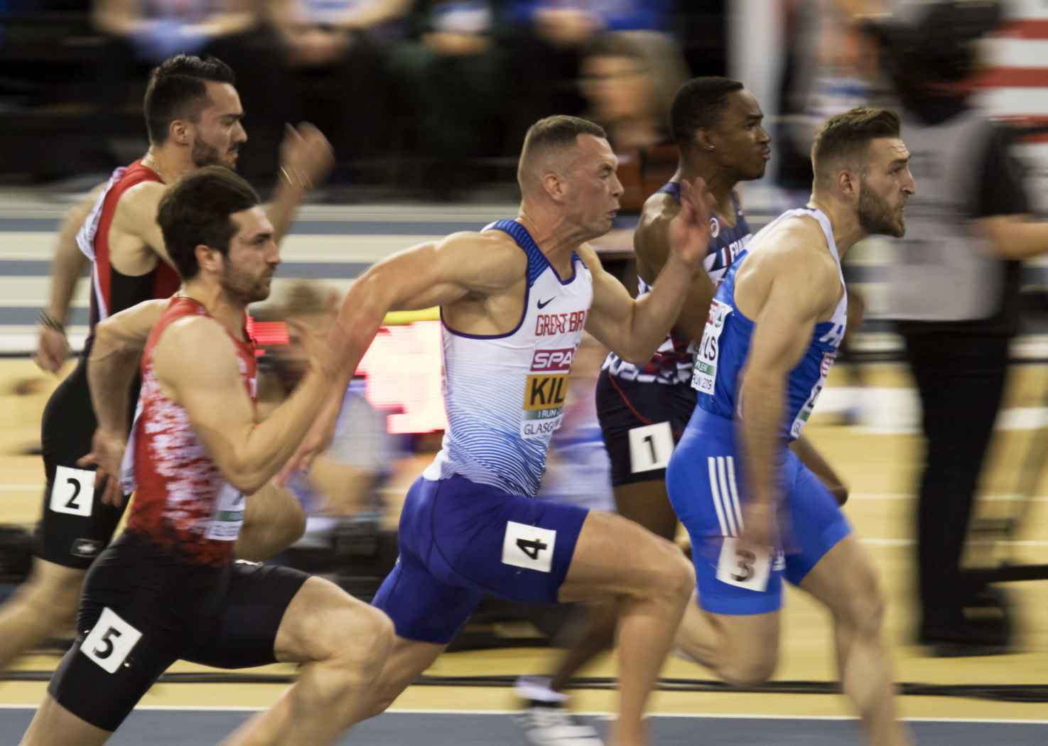 EKI20386 semis 60m man